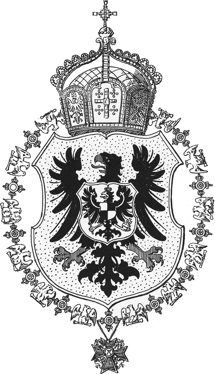 Kleines Wappen des Deutschen Kaisers 1871-1889